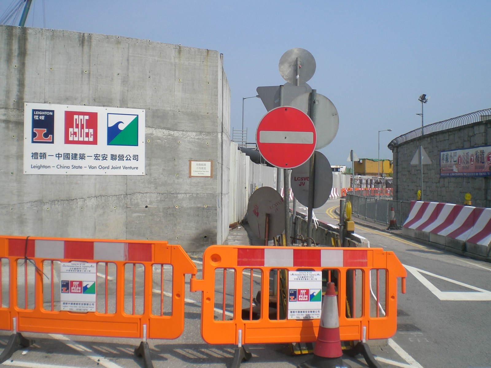 中國建築國際集團 中環及灣仔填海計劃 - 愛丁堡廣場往龍匯道方向